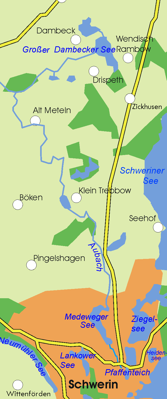 Verlauf des Aubachs bei Schwerin